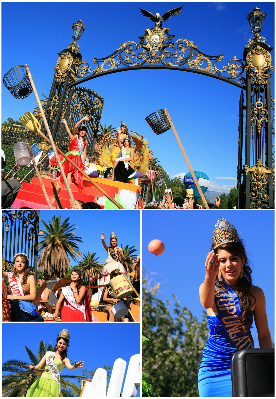 Carrusel de las Reinas. Fiesta Nacional de la Vendimia.